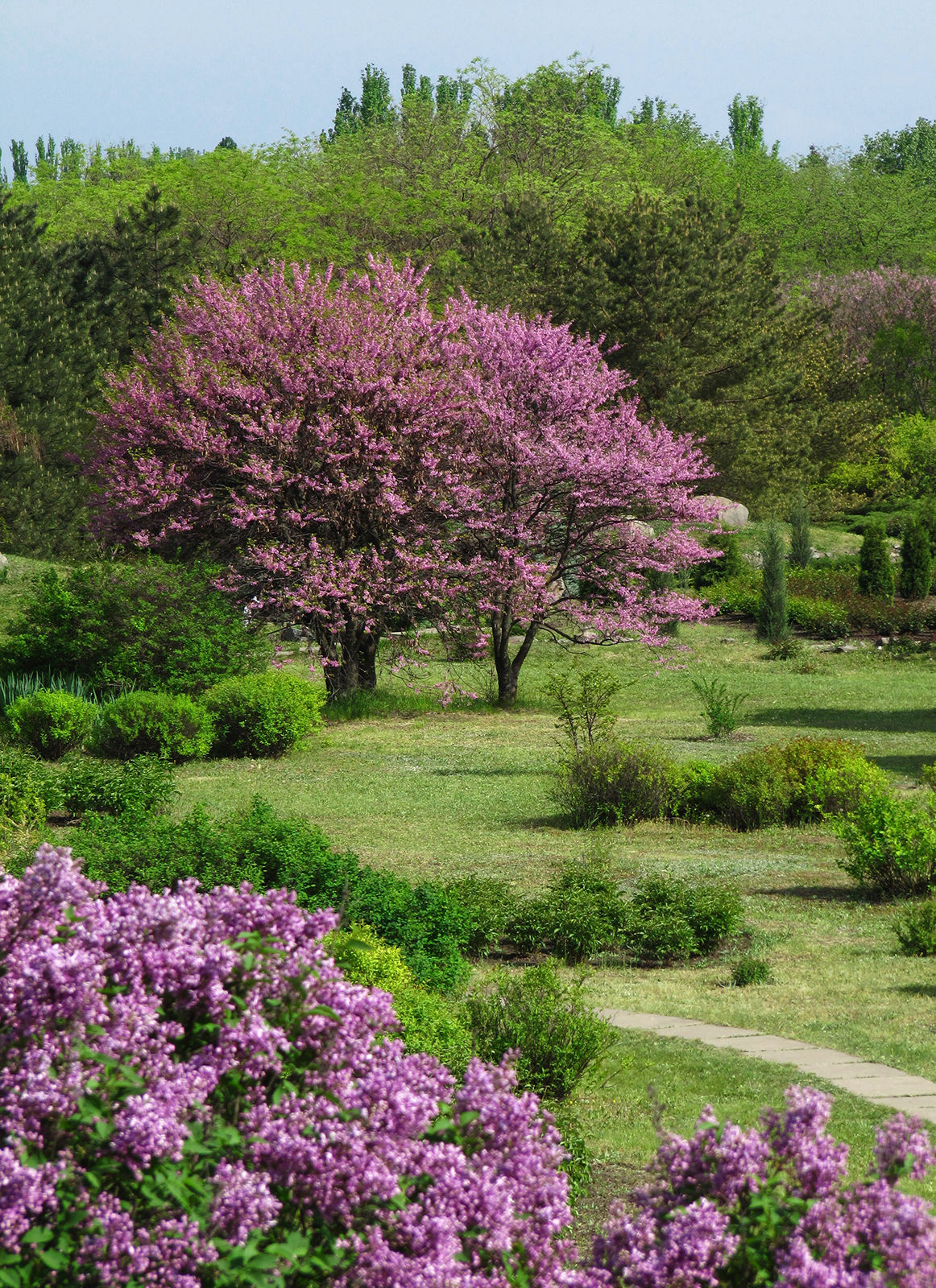 Вид з альпійської гірки. Це фото брало участь в великій щорічній фотовиставці клубу "Ікар" в 2010році